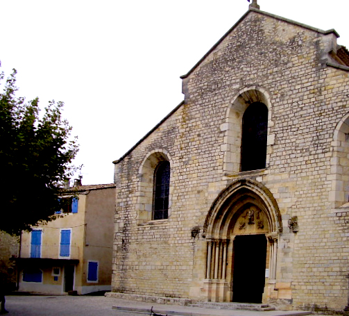 église de Saint-Marcel-lès-Sauzet (Drôme)